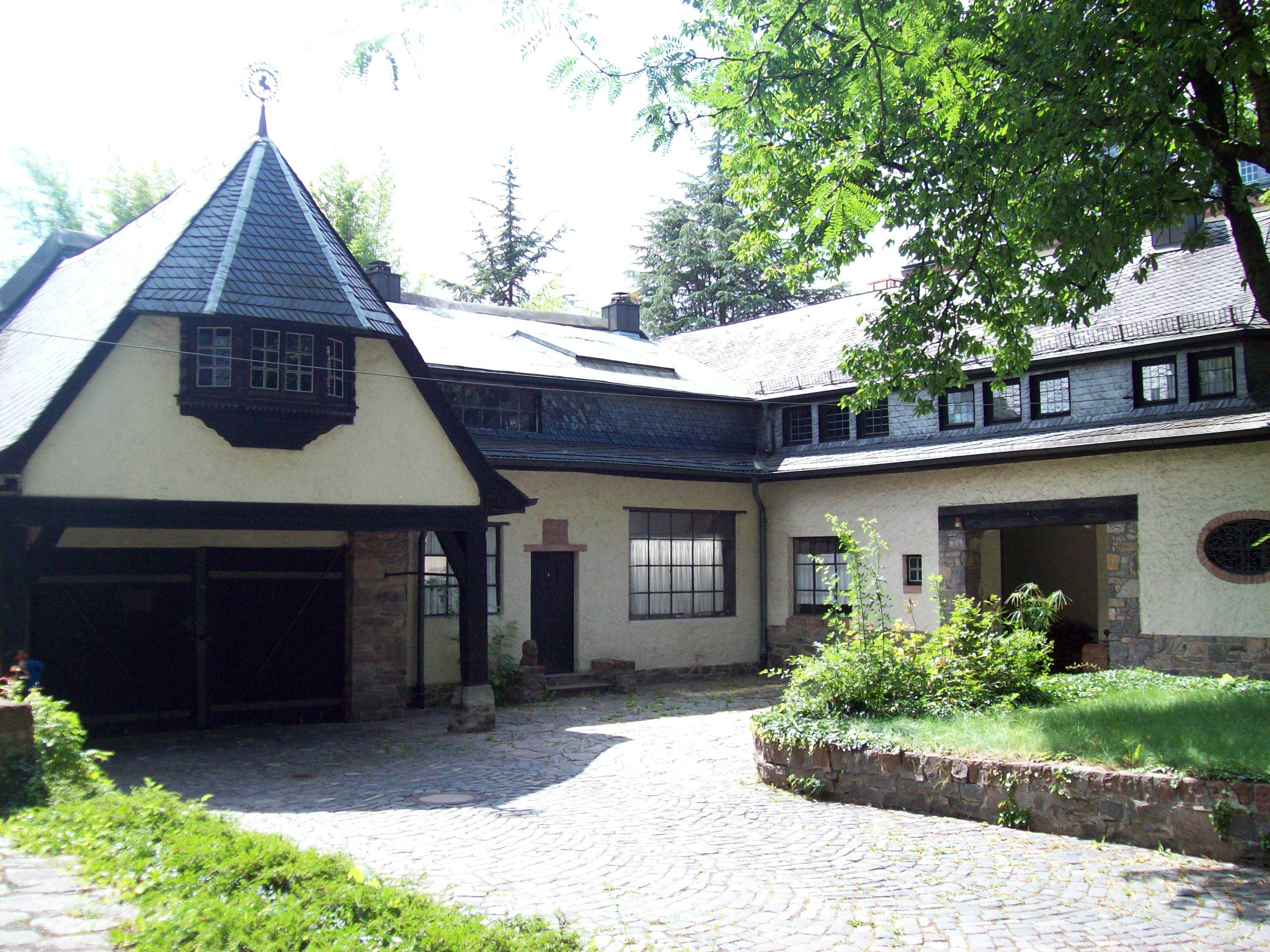 Gentilhaus, Haus für die Kunstsammlungen Anton Kilian Gentils, Aschaffenburg, Grünewaldstrasse 20, Nebengebäude, Waschküche Autohalle erbaut 1924, im zweiten Bauabschnitt 1929 Atelier für Sohn Otto Gentil